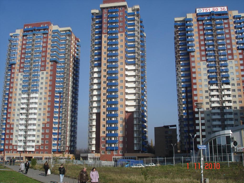 Жилой комплекс Монте-Плаза (Харьков), проспект Ленина 45/1